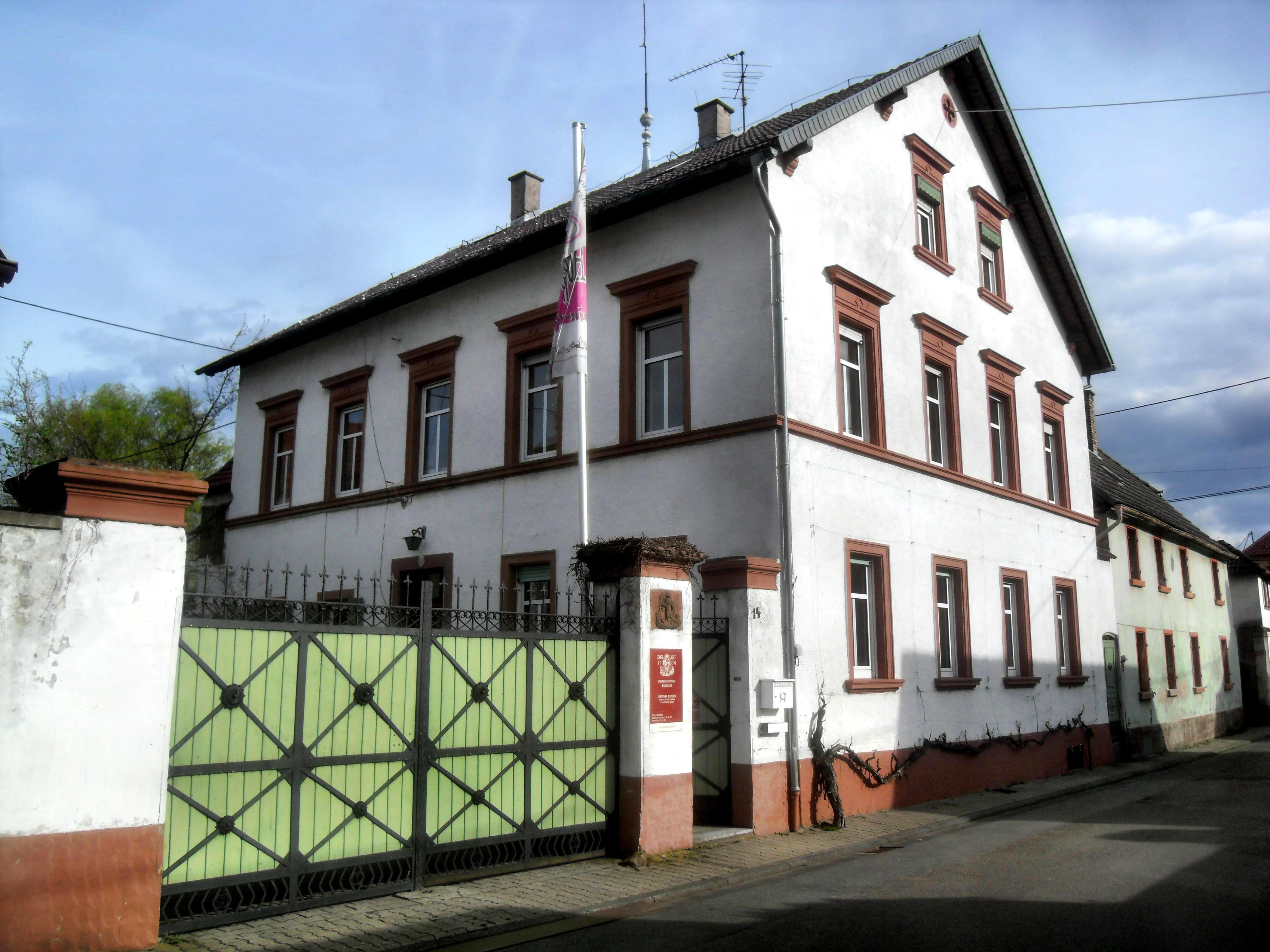 Der Domhof im rheinhessischen Guntersblum in Rheinland-Pfalz (Deutschland)